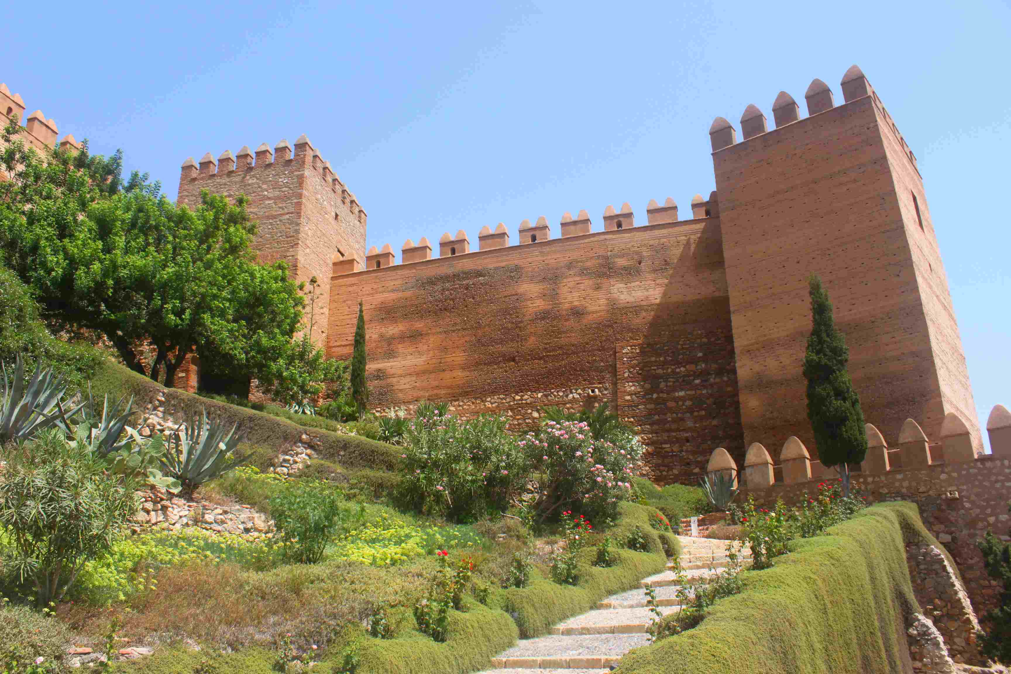 Die Alcazaba ist eine maurische Festungin Almería. Der Aufgang.